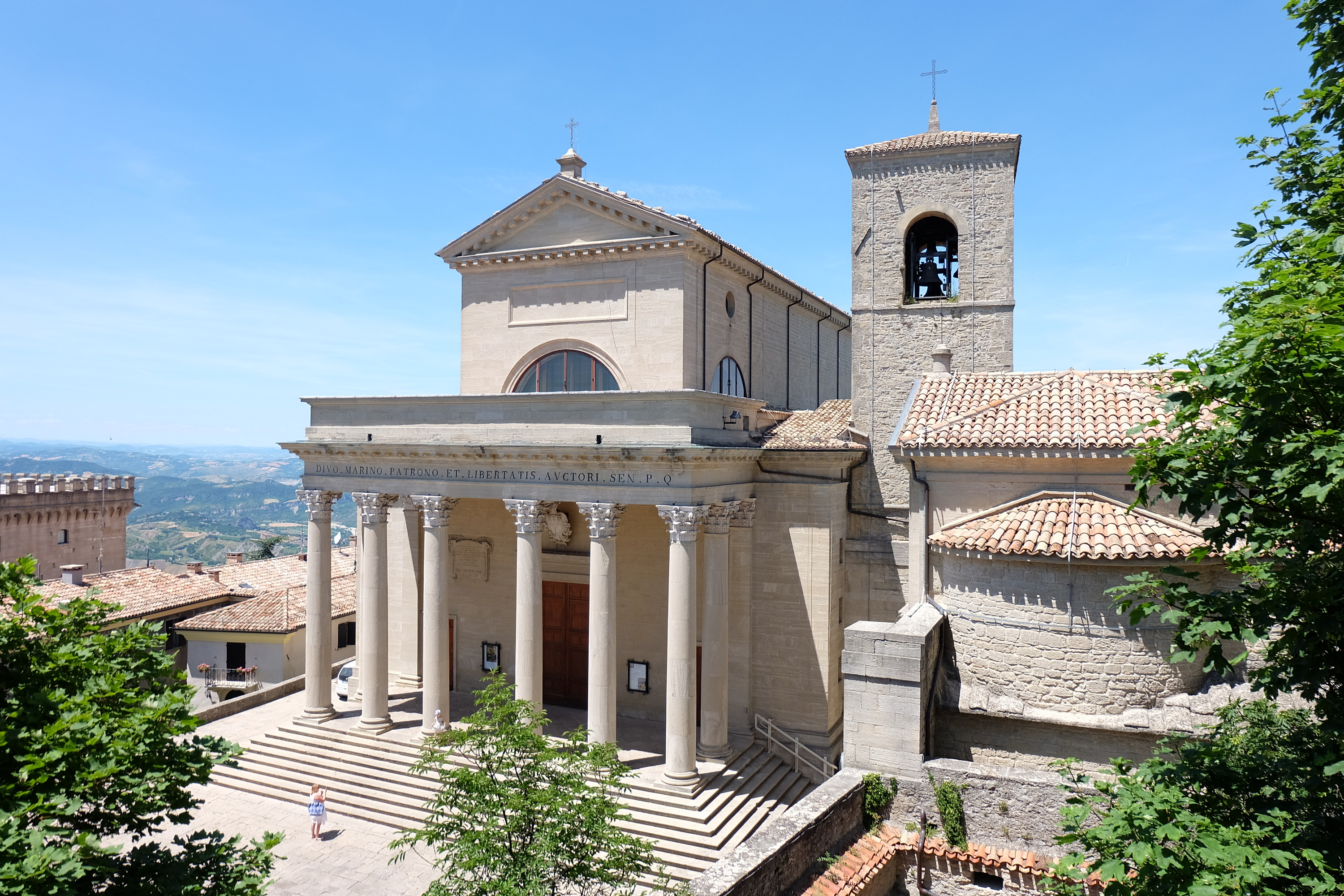 Bazylika świętego Maryna w San Marino.